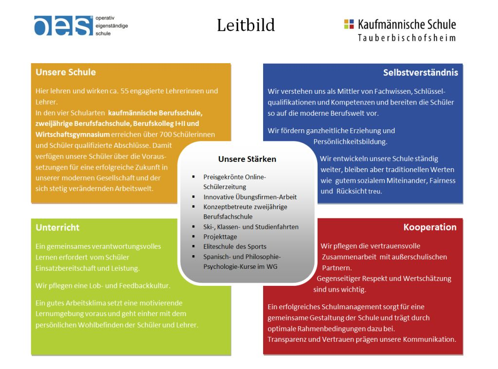 KSTBB OES - CI Leitbild 2010 - Leitbild der Kaufmännischen Schule Tauberbischofsheim